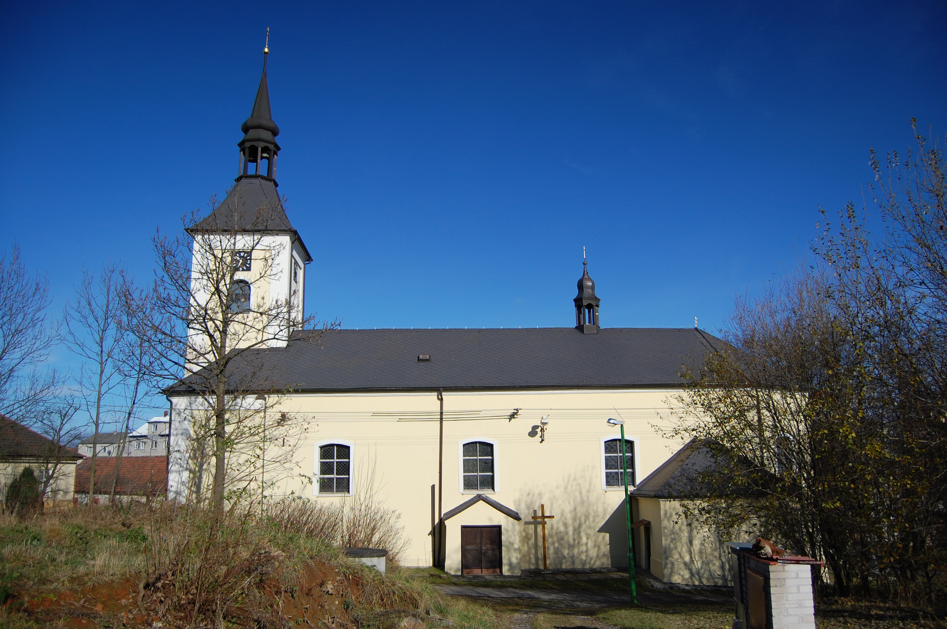 Kostel svatého Petra a Pavla - boční pohled, Brodek u Konice, okres Prostějov